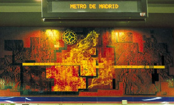 Mural de cerámica en la estación Barajas Pueblo del metro de Madrid. Proyecto y realización de Carlos Alonso Pérez (Alfar del monte spanish potter & ceramics in Pozancos, Guadalajara, Spain), and Luis Sardá (Estudio Sardá de Diseño, in Ures, Guadalajara, Spain).